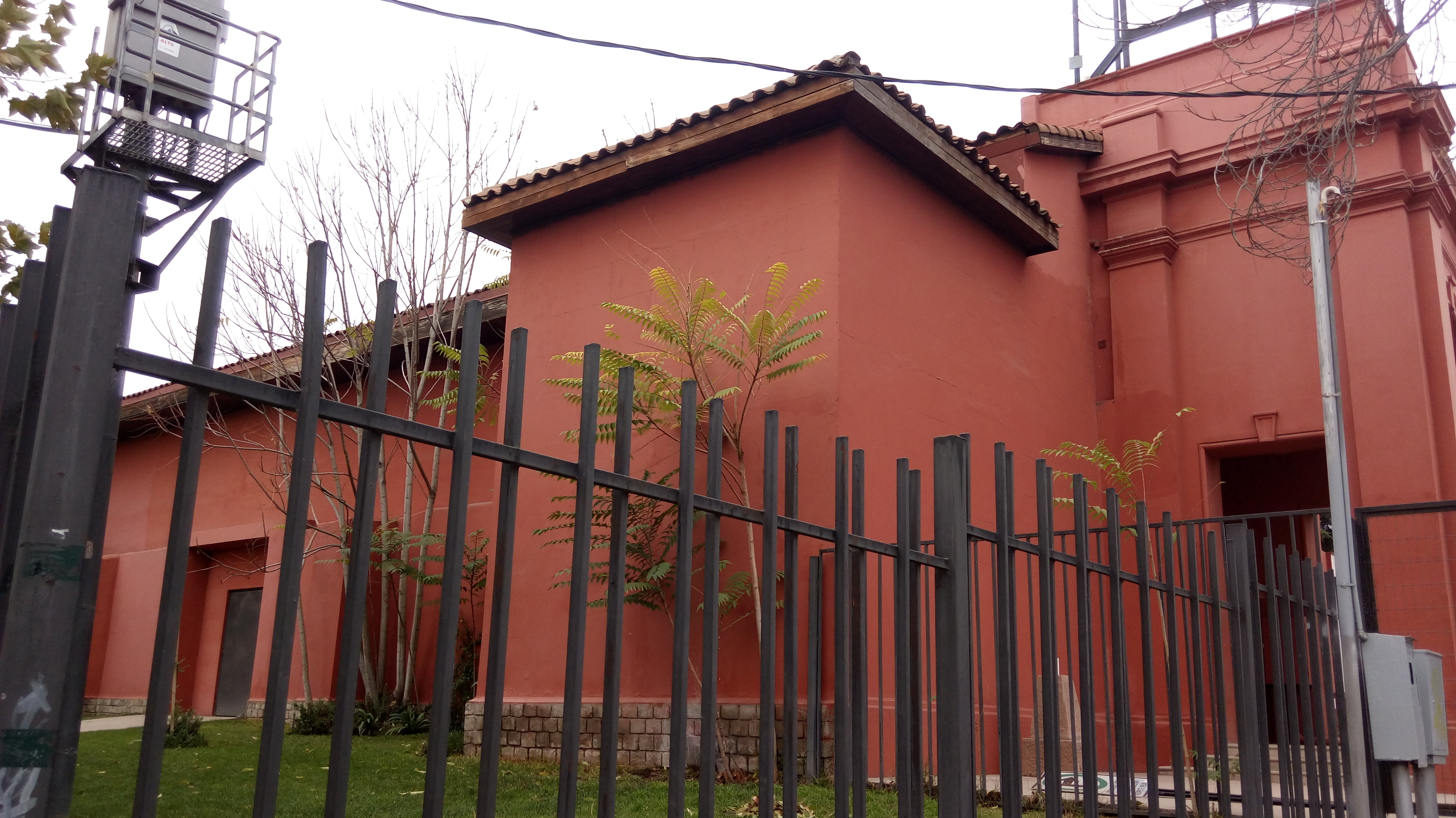 Parte de fachada conservada de la antigua Iglesia de la Inmaculada Concepción de Colina, ahora Centro Cultural